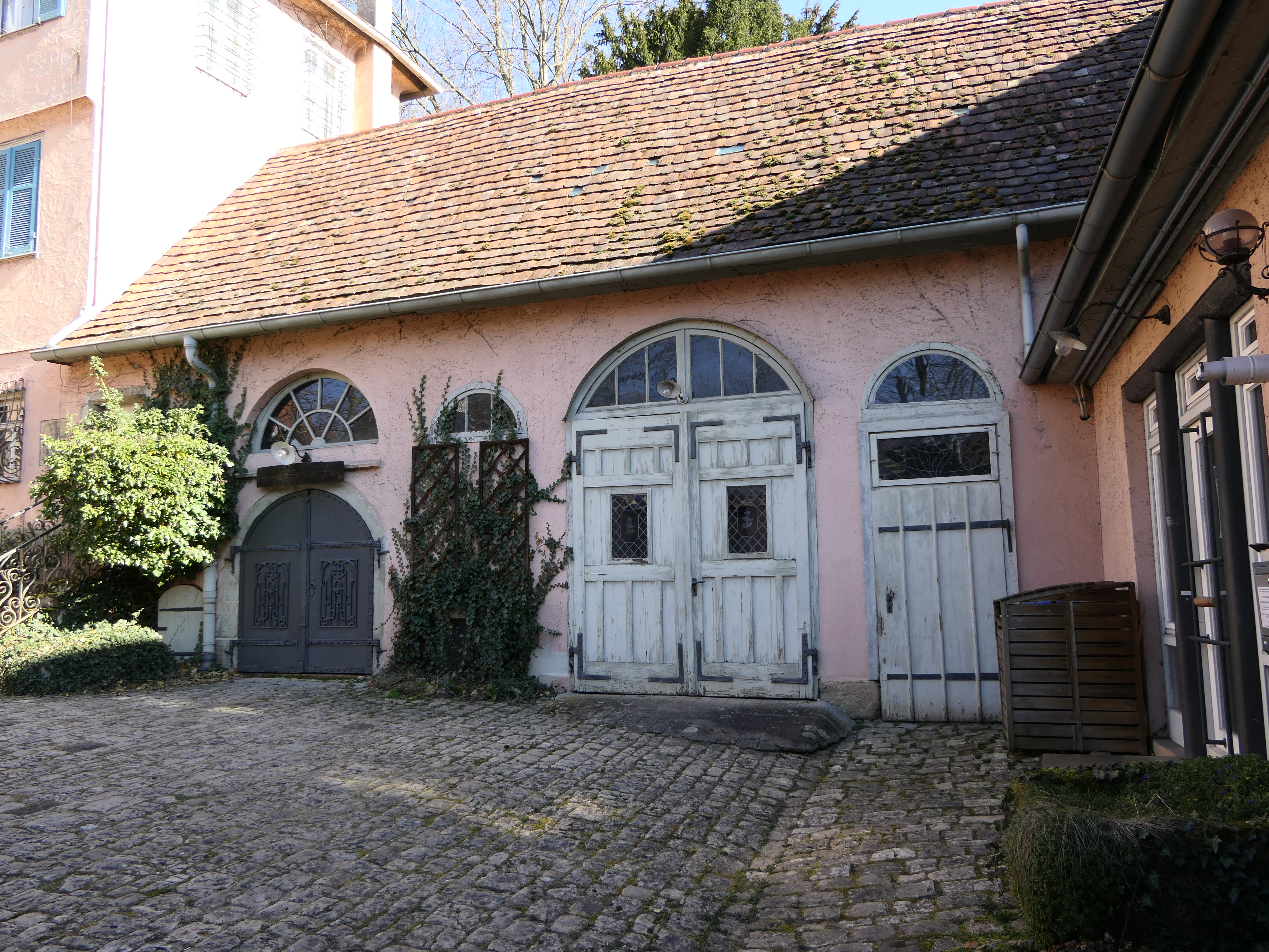 Das Schloss Grossheppach im gleichnamigen Teilort der Stadt Weinstadt im Rems-Murr-Kreis. Wirtschaftshaus mit Zugang zum historischen Schlosskeller.